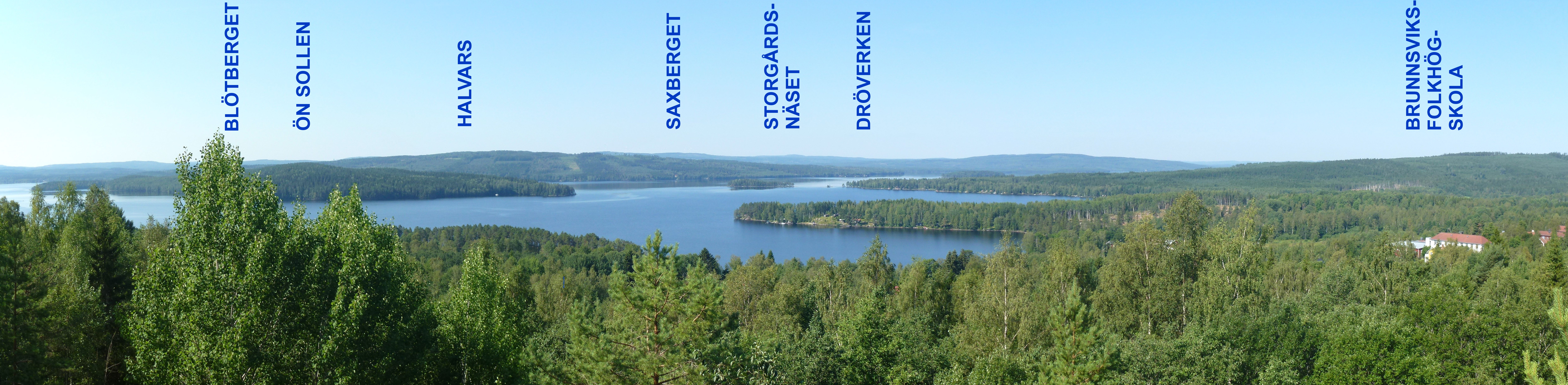 Utsikt från Lekombergs gruva över Väsman